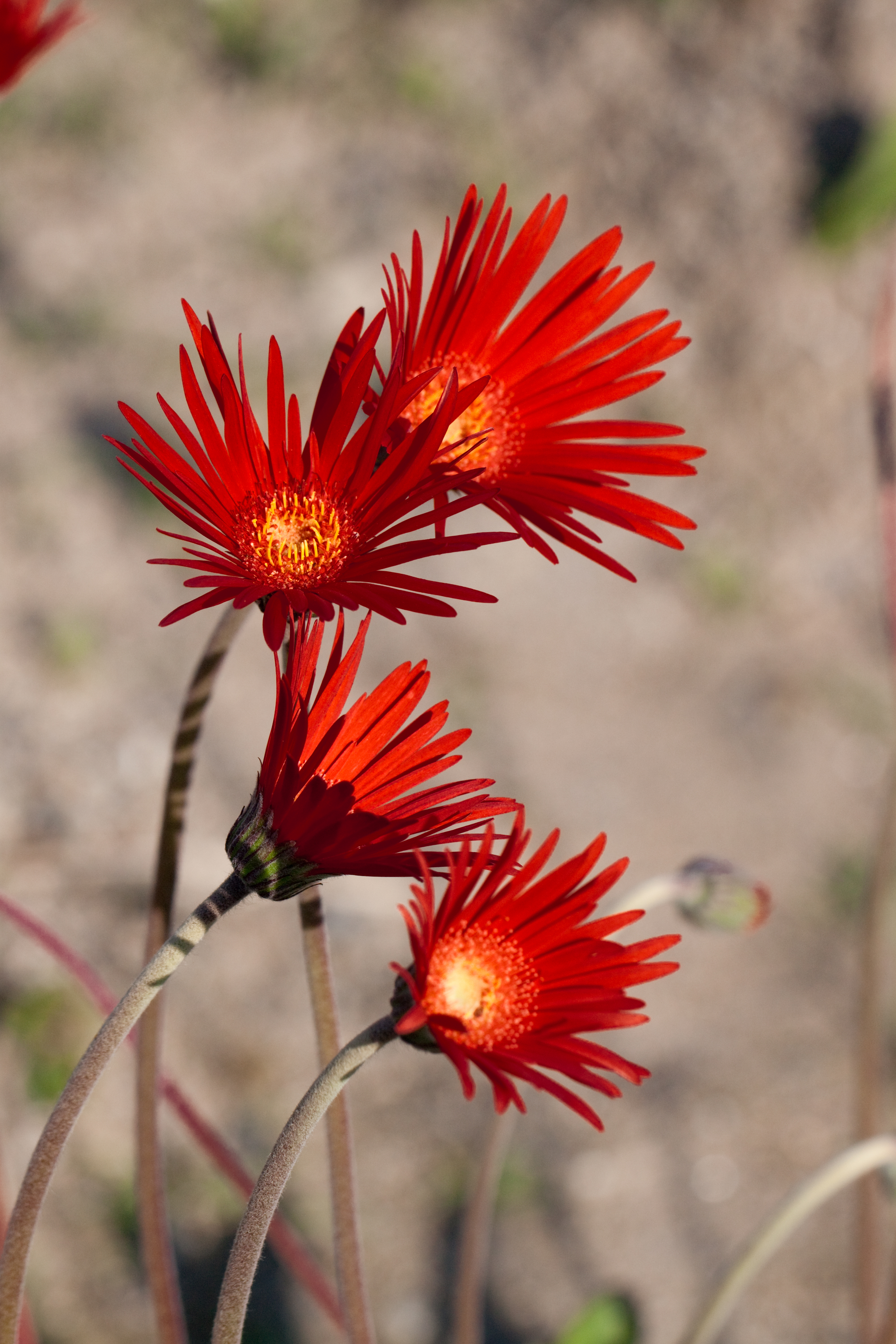 Gerbera Jamesonii. オオセンボンヤリ（大千本槍）。